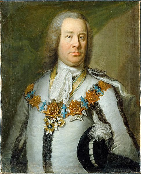 Fabian Wrede af Elimä d.y., svensk, Född 1694, Död 1768. Avmålad av: Johan Henrik Scheffel, svensk, Född 1690, Död 1781. Tillskriven.